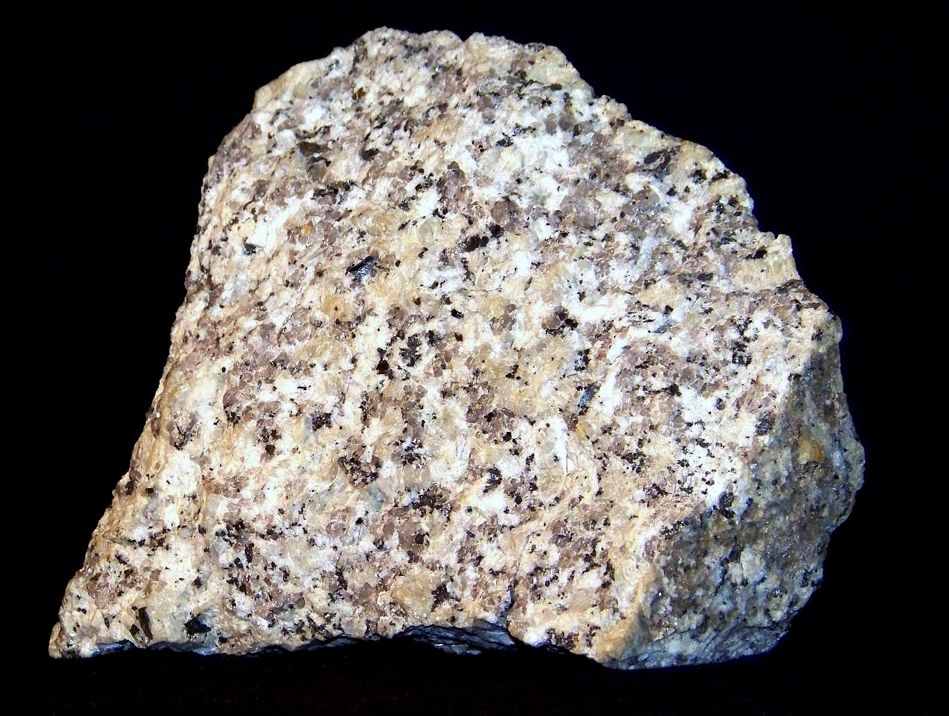 Granit z masywu strzelinskiego